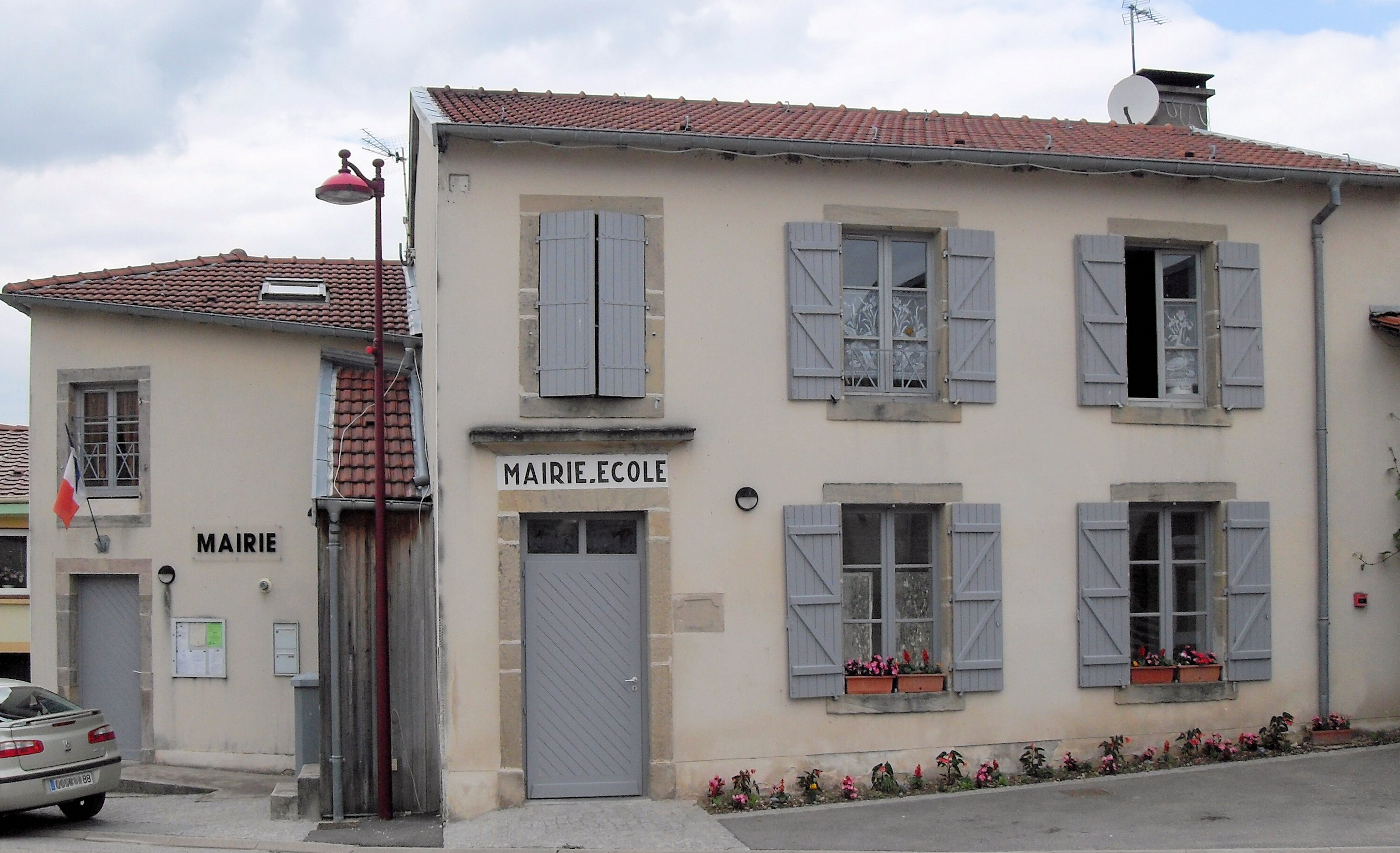 La mairie-école de Saint-Vallier